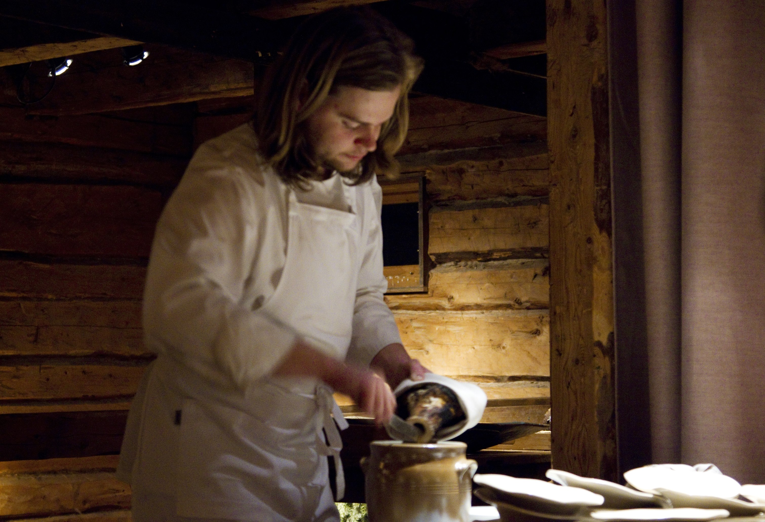 En underbar middag på Fäviken Magasinet. Förberedelser av rostat märgben av ko. Magnus gröper ur märgen från det uppsågade benet.